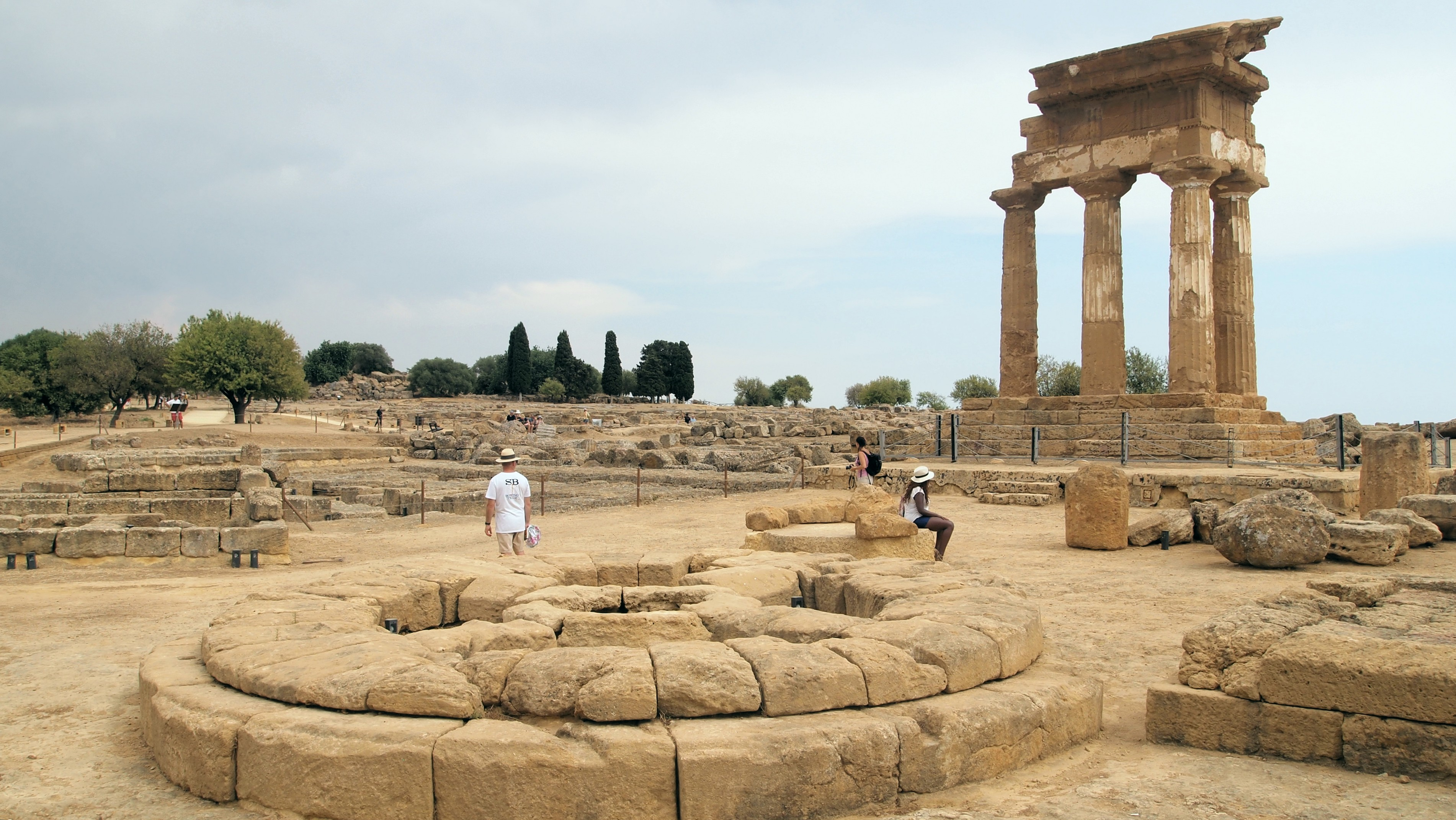 Il tempio dei Dioscuri e il santuario di Demetra nella Valle dei Templi